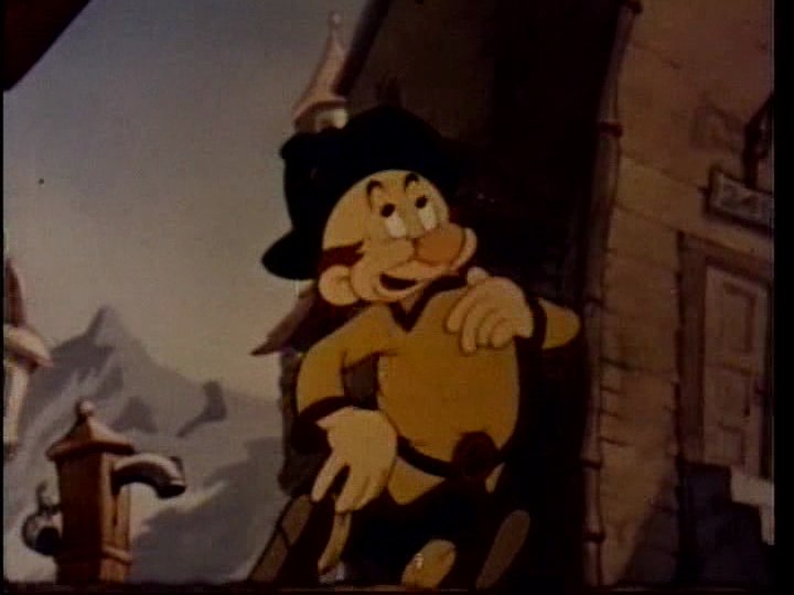 Gabby en una escena de 'All's Well' (1941). La caricatura está en dominio público.